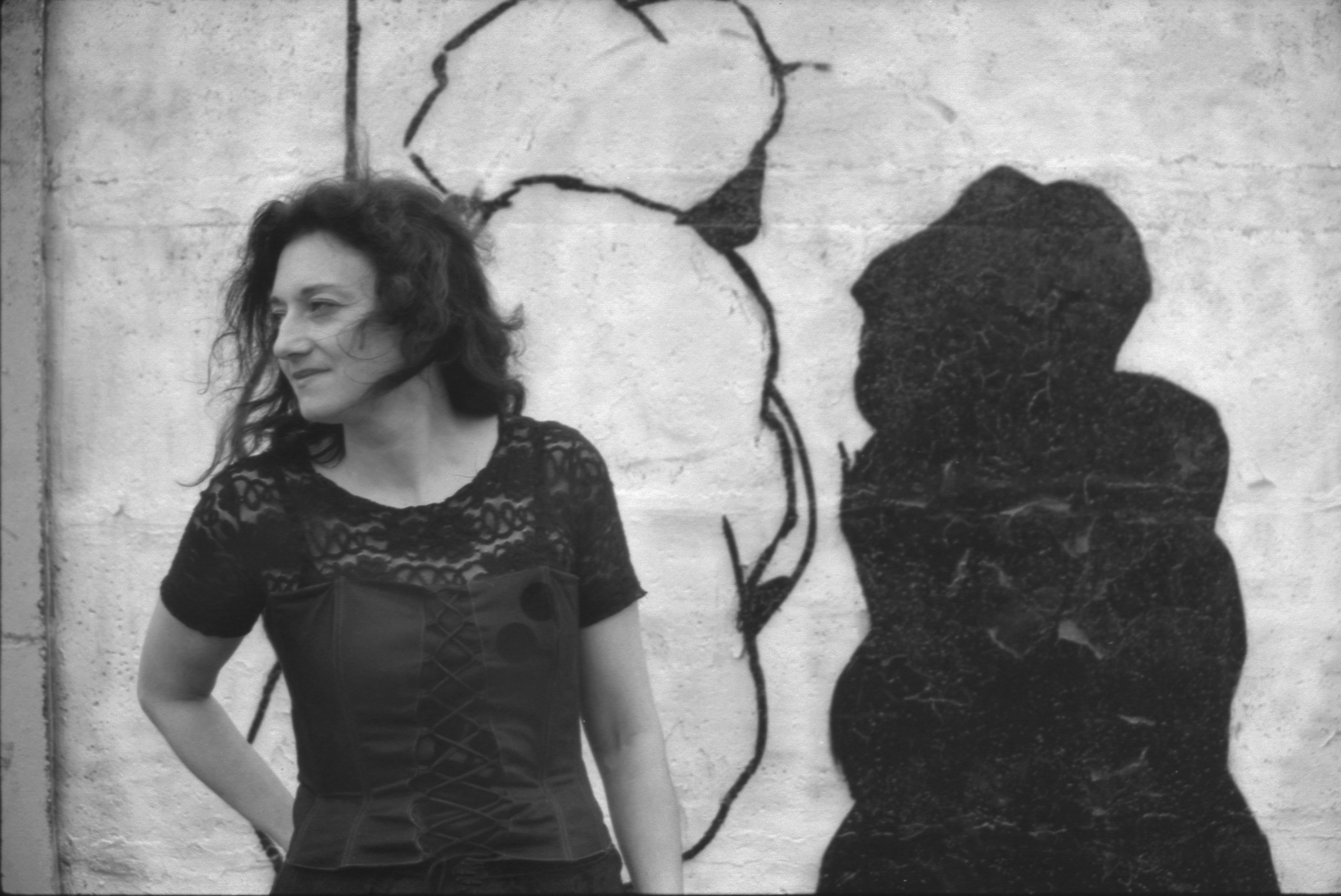 Fátima Rodríguez (Canal Latéral. Toulouse)